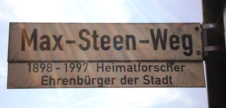 Straßenschild Max-Steen-Weg mit Infotafel